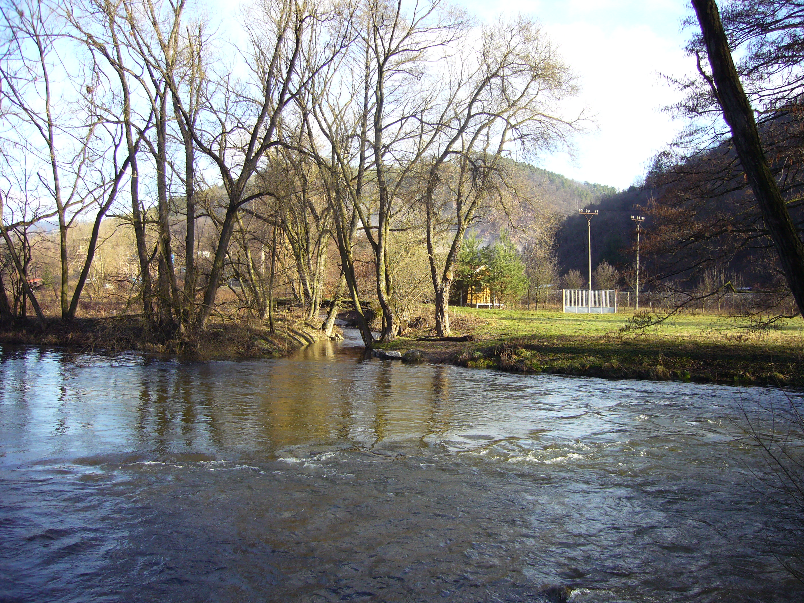 Debouchment of Besének brook into Svratka river in Předklášteří.